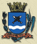 Brasao da cidade de Barrinha localizada no estado de São Paulo. Fonte Prefeitura de Barrinha. Scaneado de um antigo panfleto do anos 90. Licença